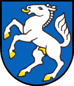 Wappen der politischen Gemeinde Füllinsdorf, Schweiz